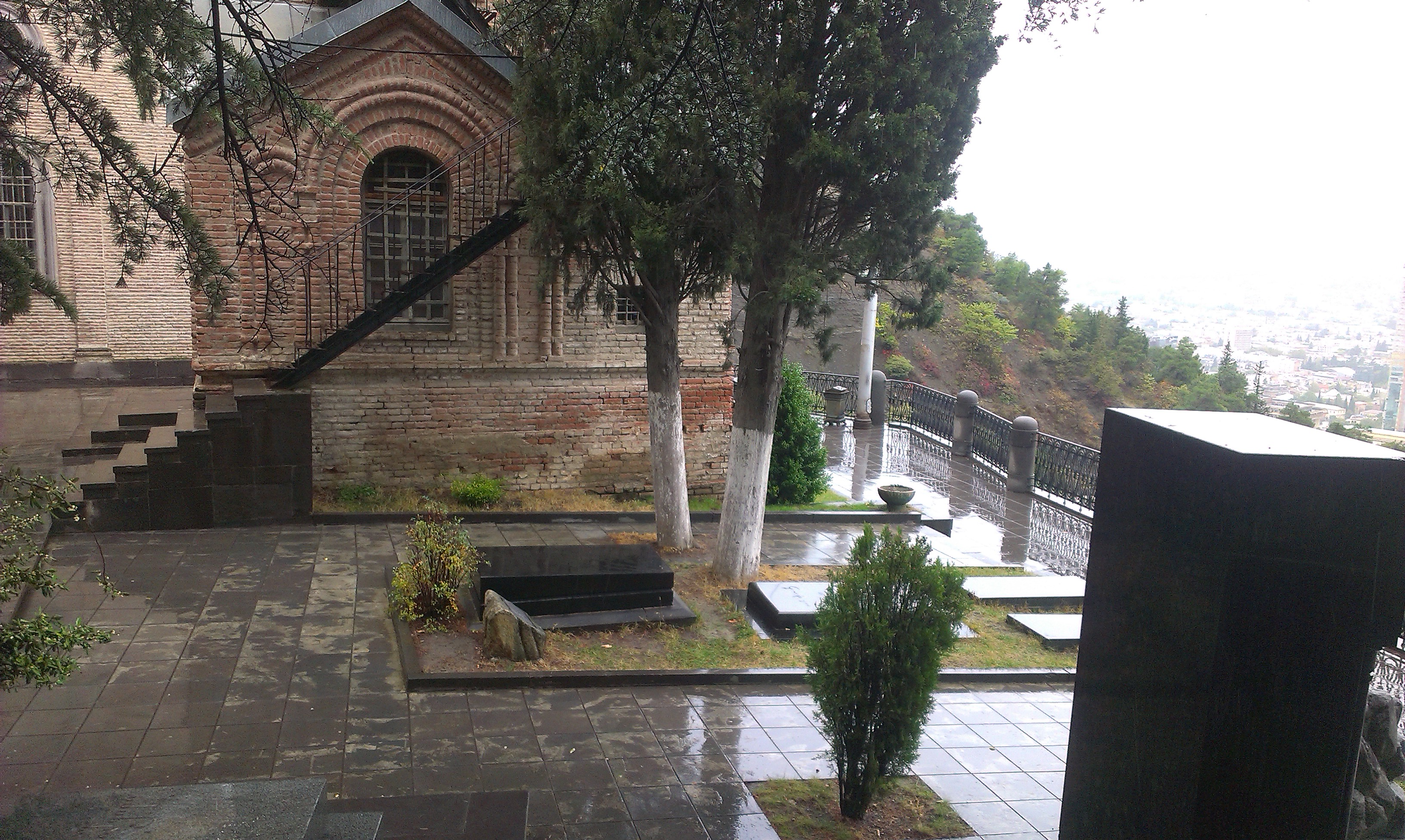 Пантеон Мтацминда. Могила Нико Николадзе (чёрная плита под деревьями) и его жены Ольги Гурамишвили (бетонный постамент)